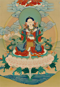 Еше Цогьял